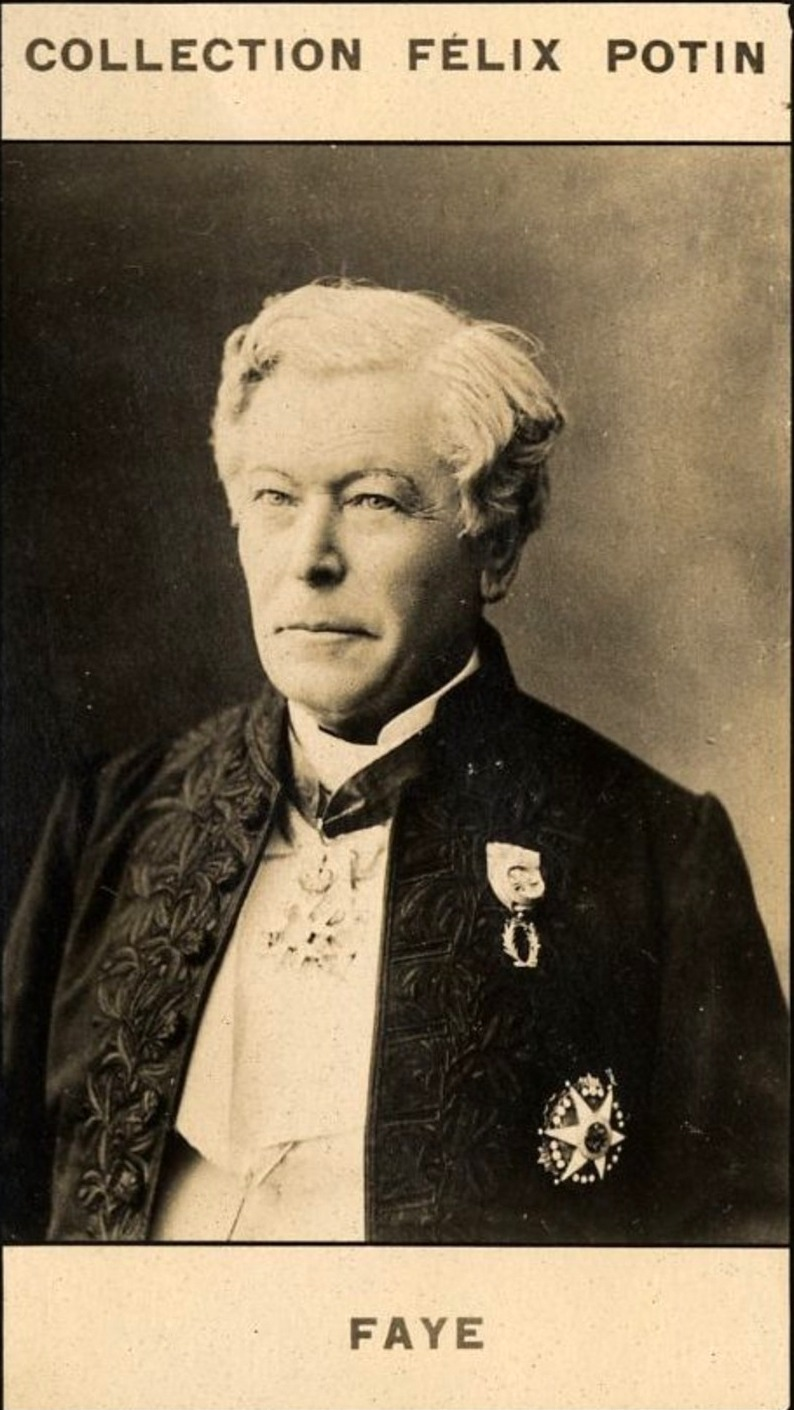 Faye, savant